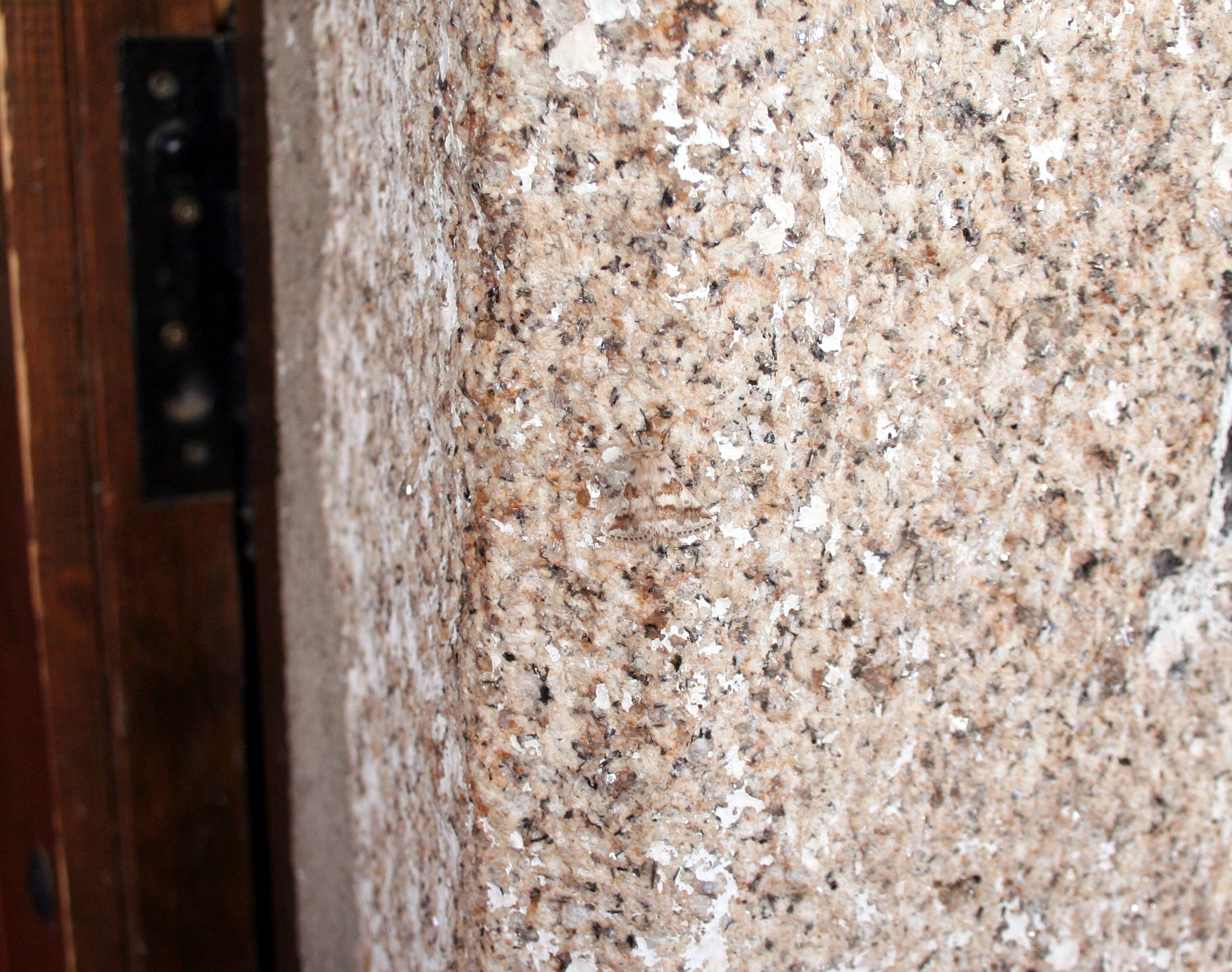 Polilla (Lepidoptera), camuflada.